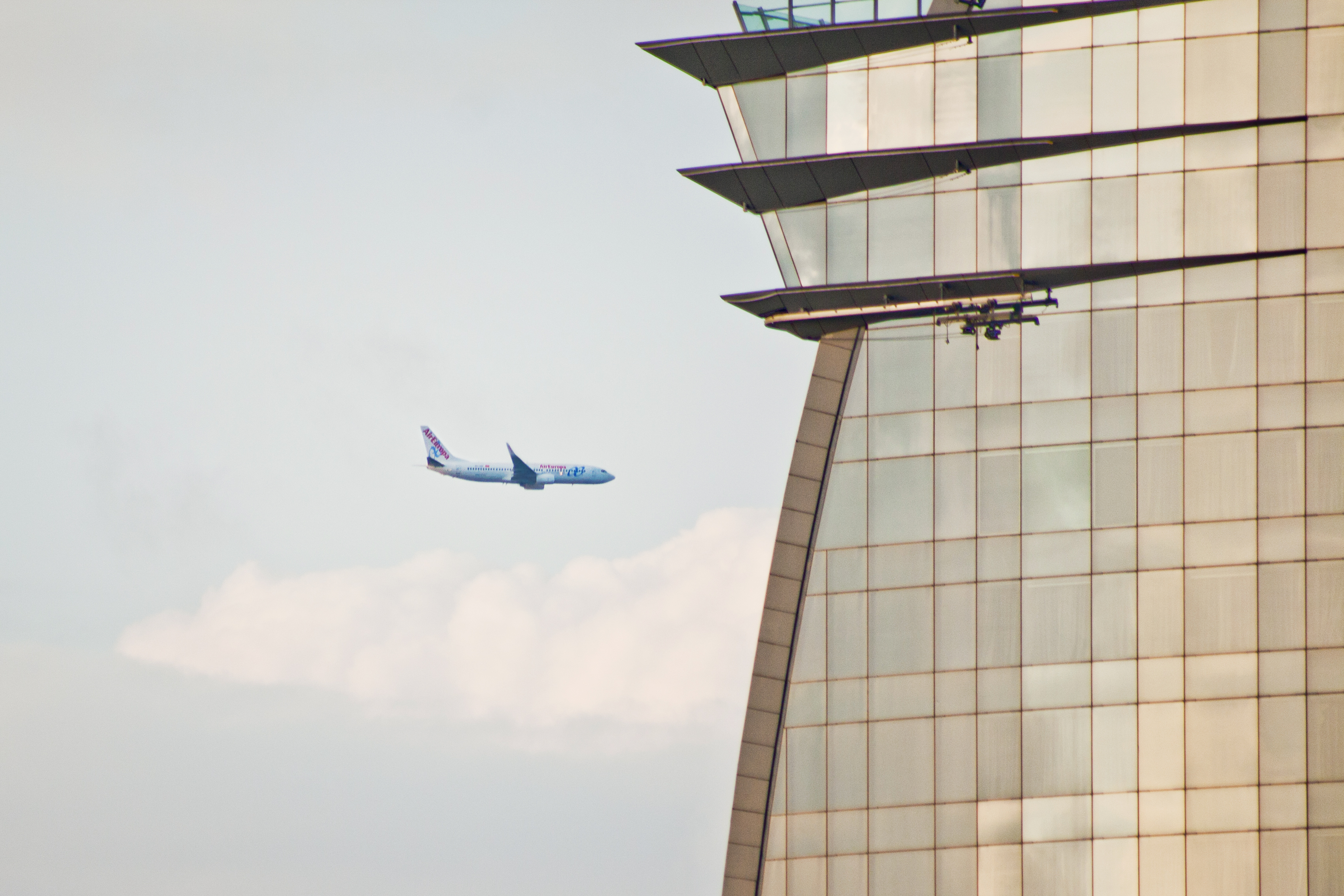 Barcelona, España